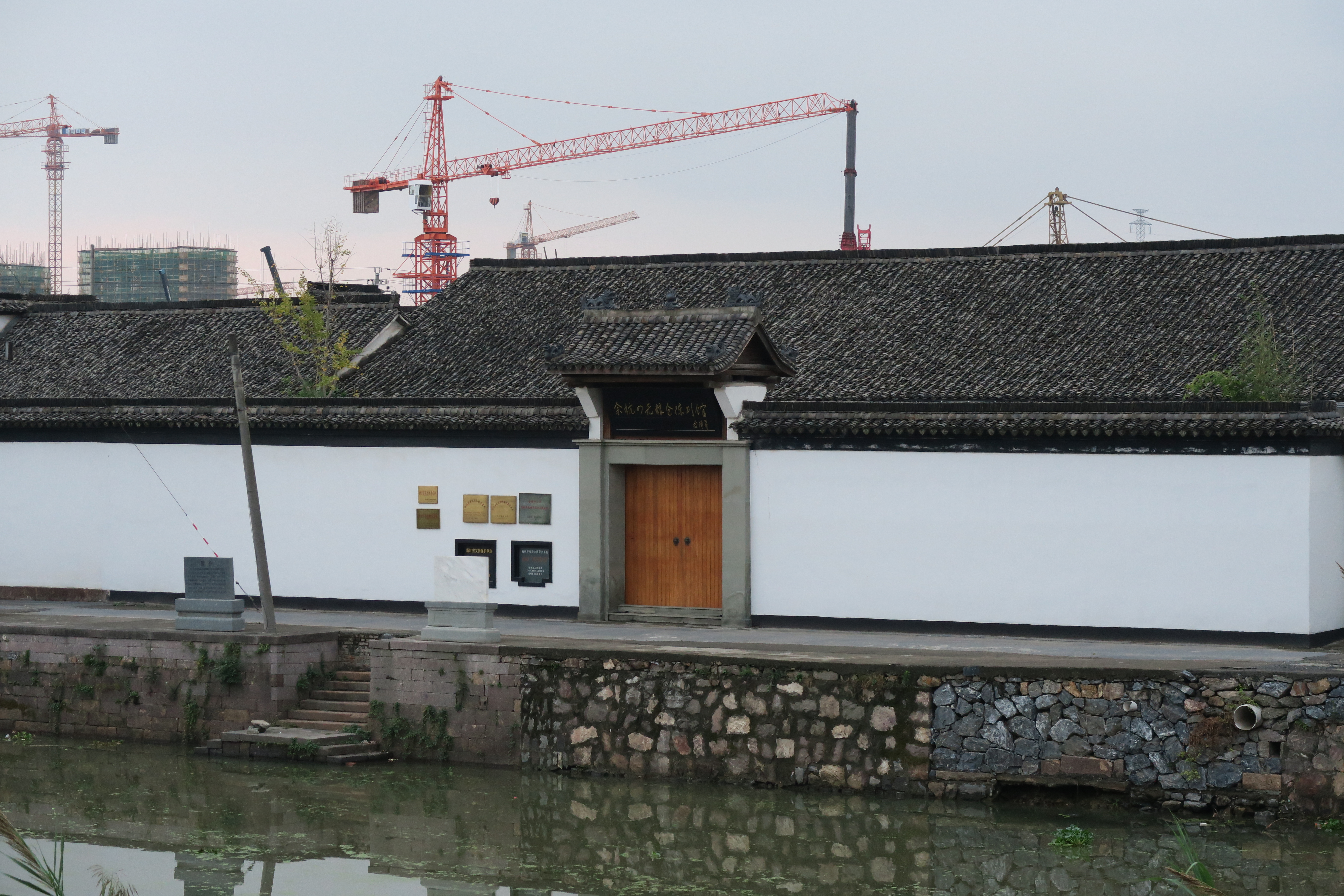 余杭仓前粮仓